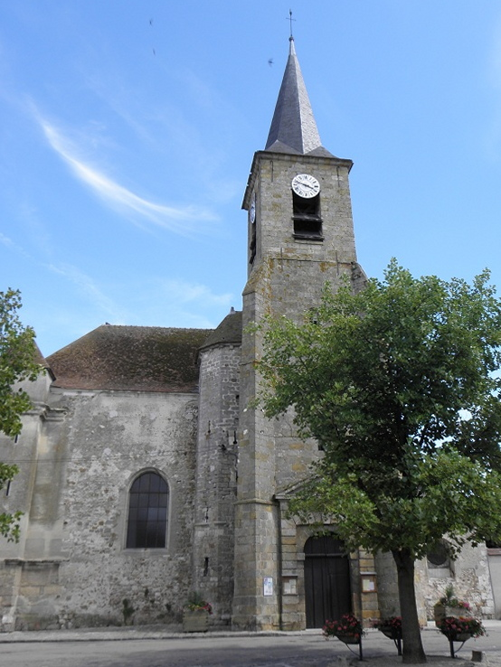 Église paroissiale Sainte-Croix de Bray-sur-Seine. (département de la Seine-et-Marne, région Île-de-France).